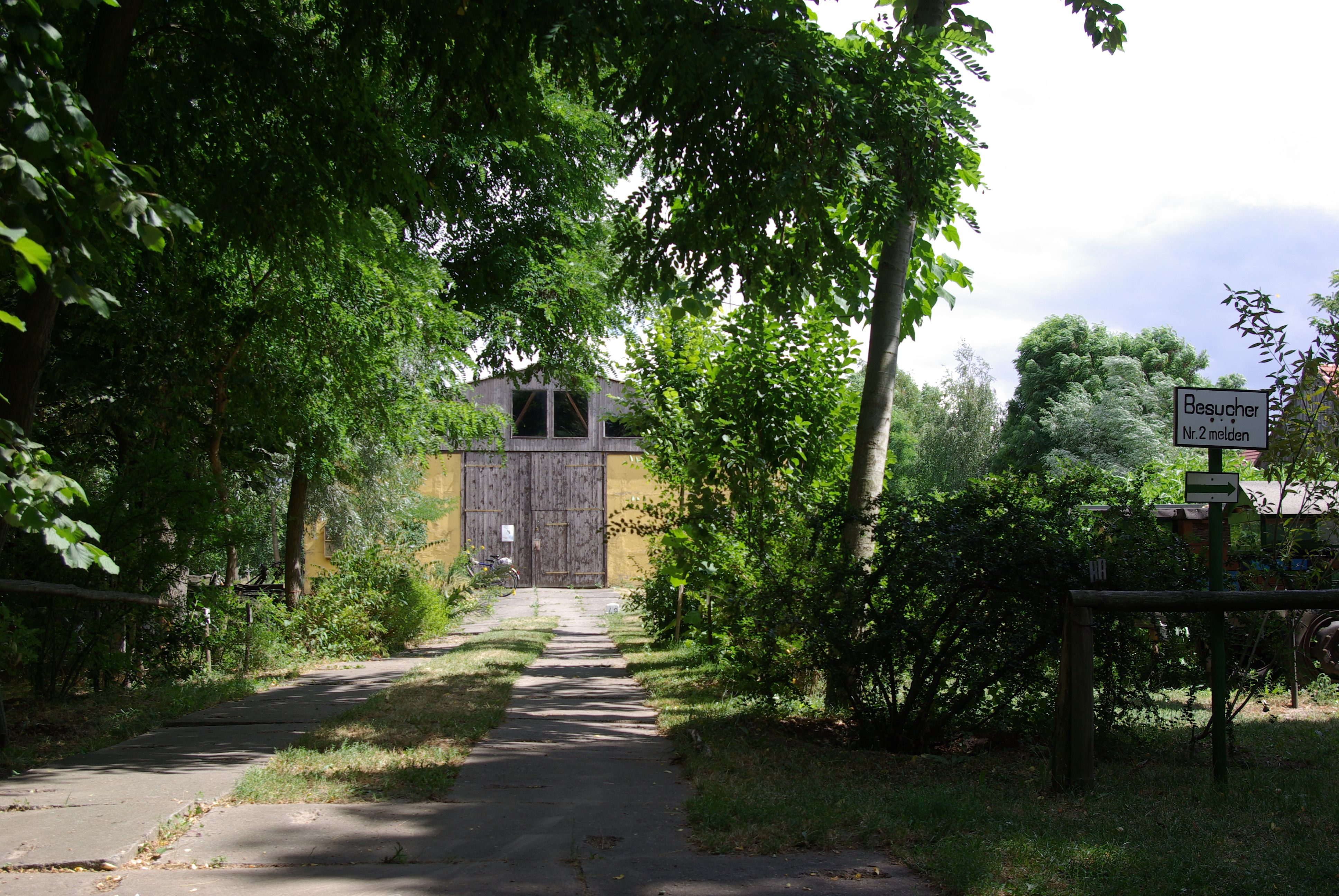 Märkisch Luch in Brandenburg. Das Bienenmuseum befindet sich im Ortsteil Möthlow. Es ist im Privatbesitz.